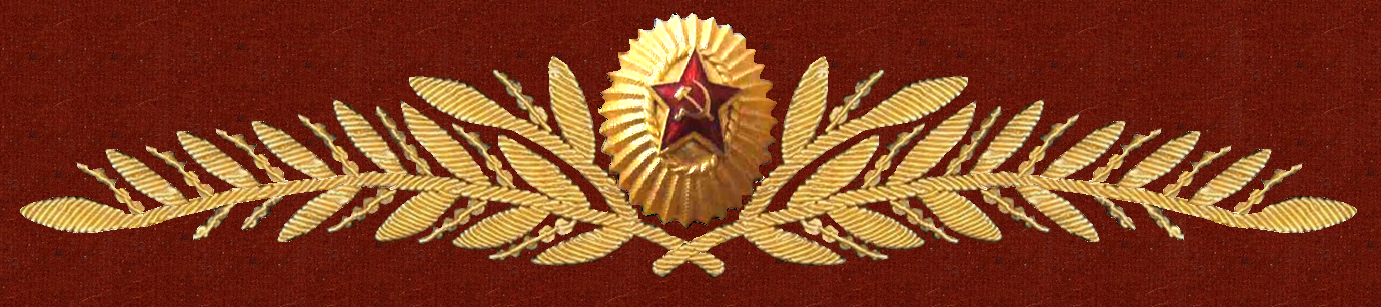 Шитье мвд 1954-1991